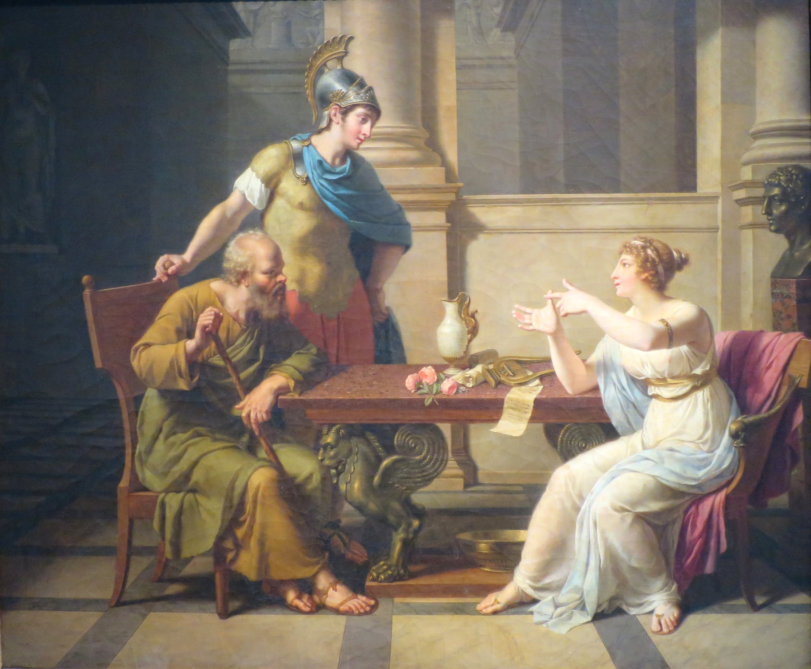 Musée Pouchkkine